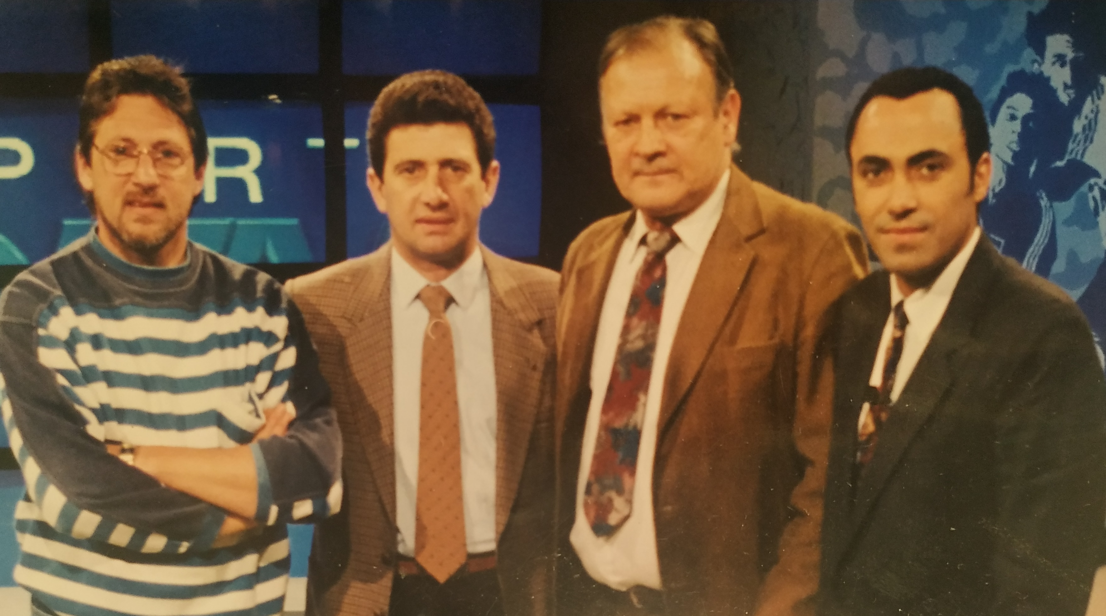 Rodolfo Pereyra conduciendo el programa Deporte Total